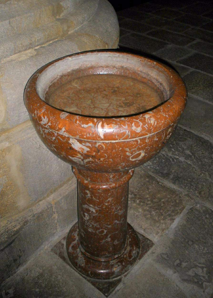 Church of Santa Marina de Oxirondo, Bergara (Gipuzkoa, Basque Country, Spain)